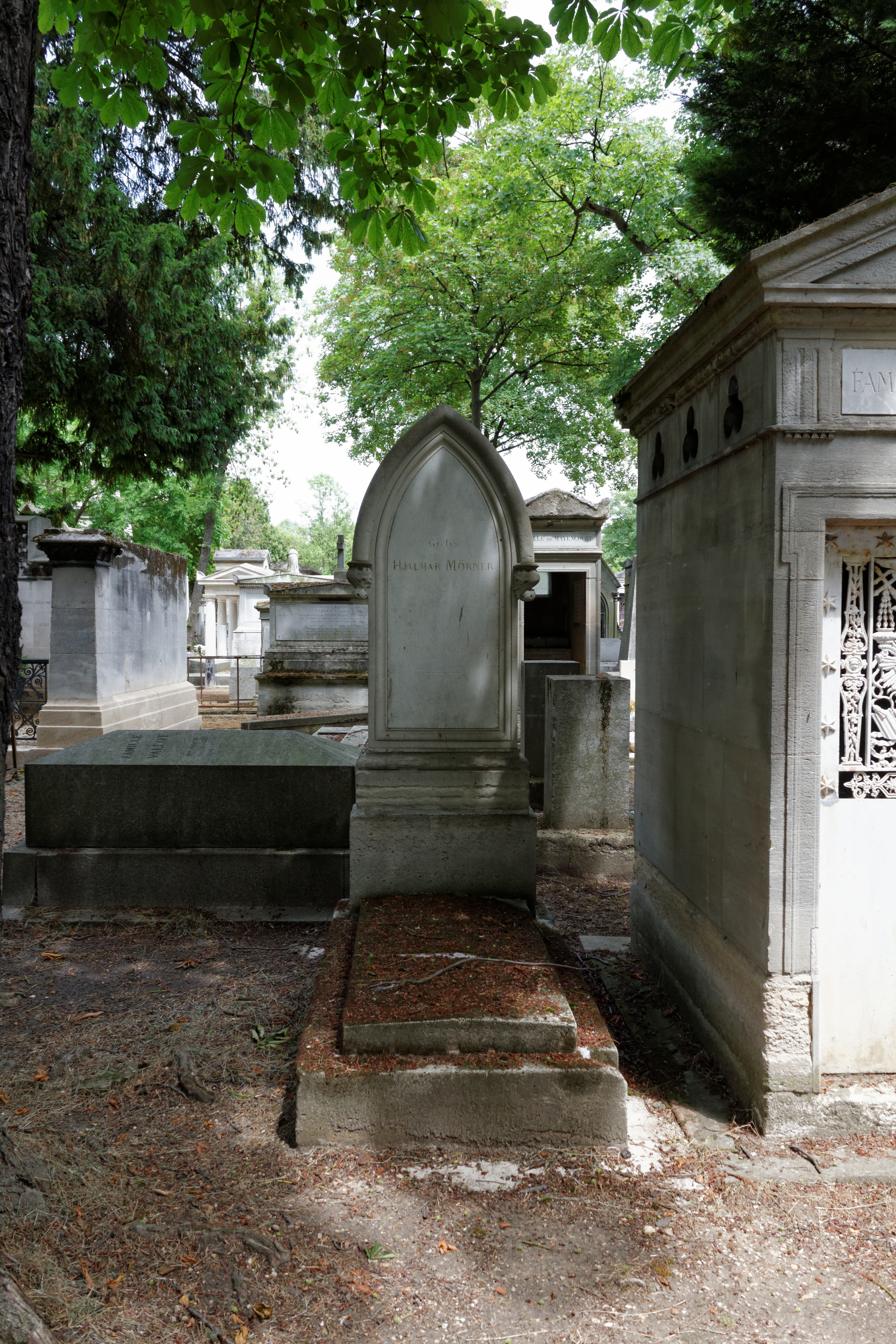 Sépulture de Hjalmar Mörner (1794-1837), peintre suédois.